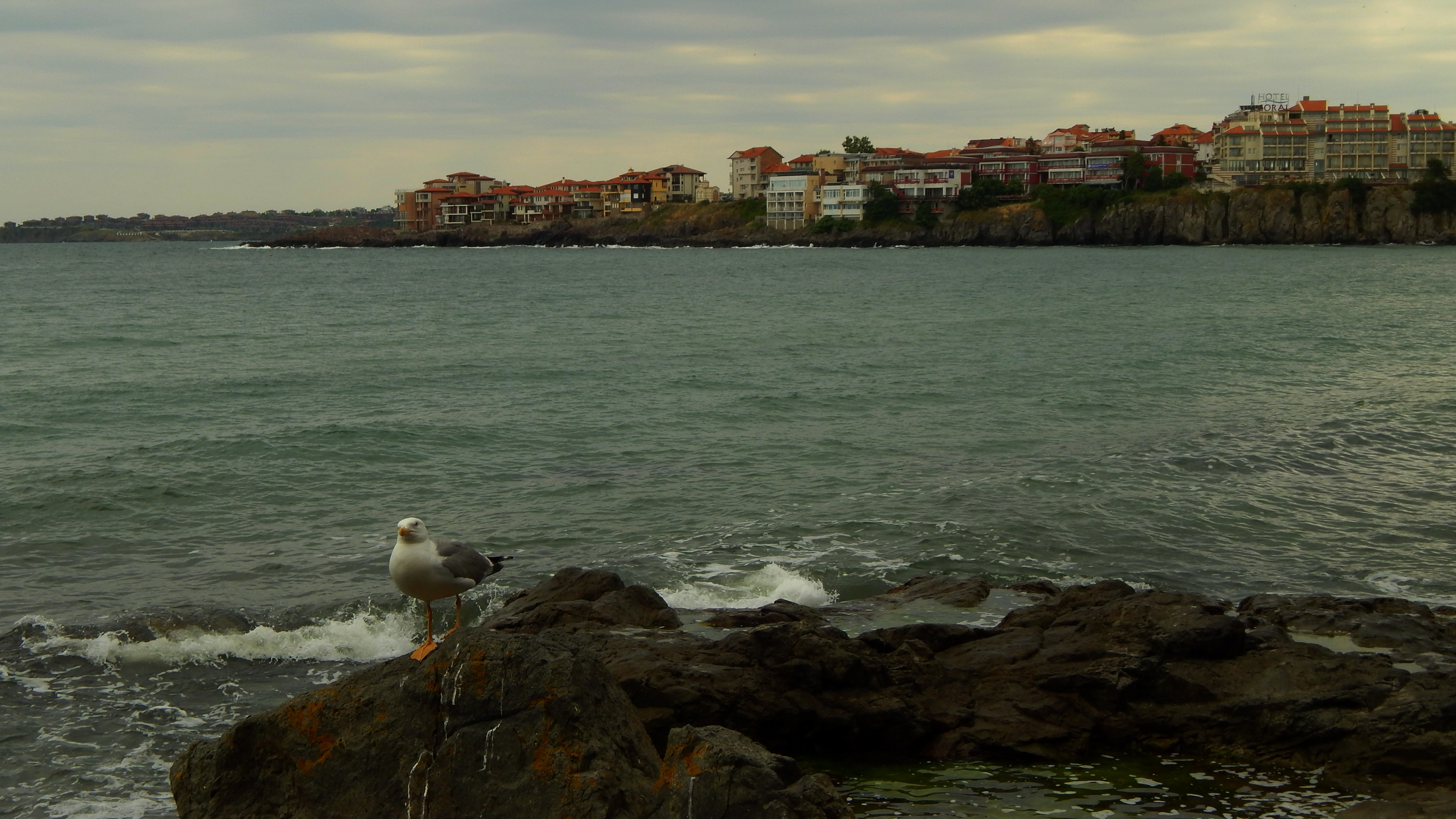 Ропотамо